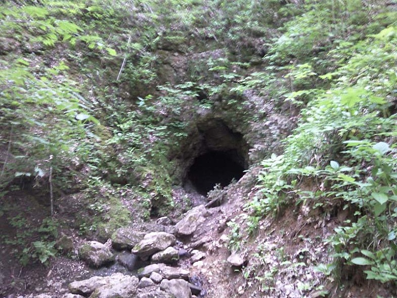 Большая Фанагорийская пещера, вход